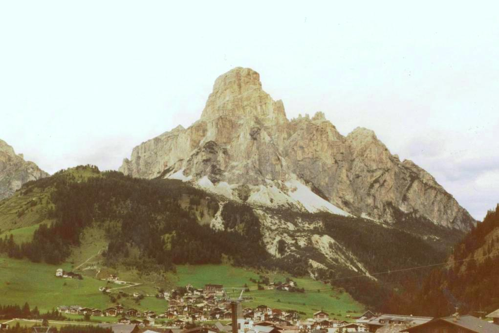 Apremont vue op de Mont Granier.